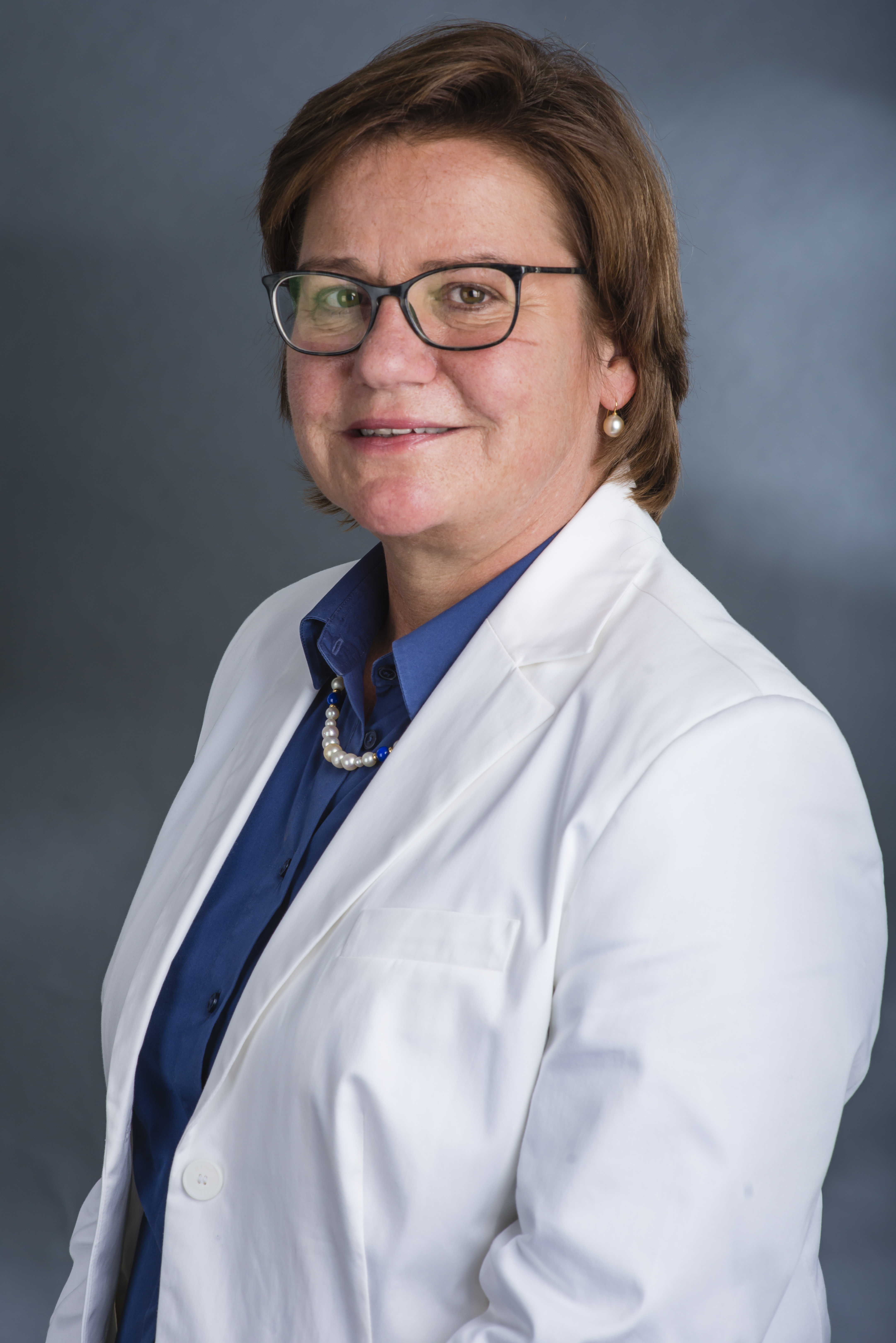 Susanne Grobien (* 28. Oktober 1960 in Bremen) ist eine deutsche Politikerin (CDU) und Mitglied der Bremischen Bürgerschaft.